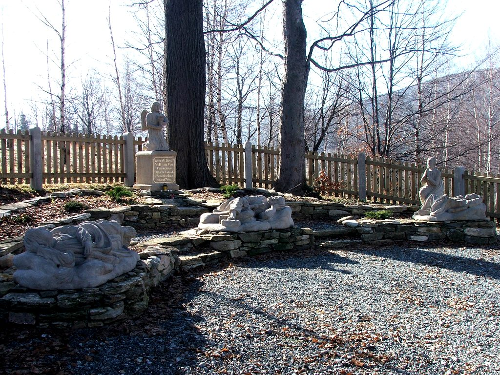 Góra Oliwna w Bolesławowie (Dolny Śląsk, Polska) – widok ogólny